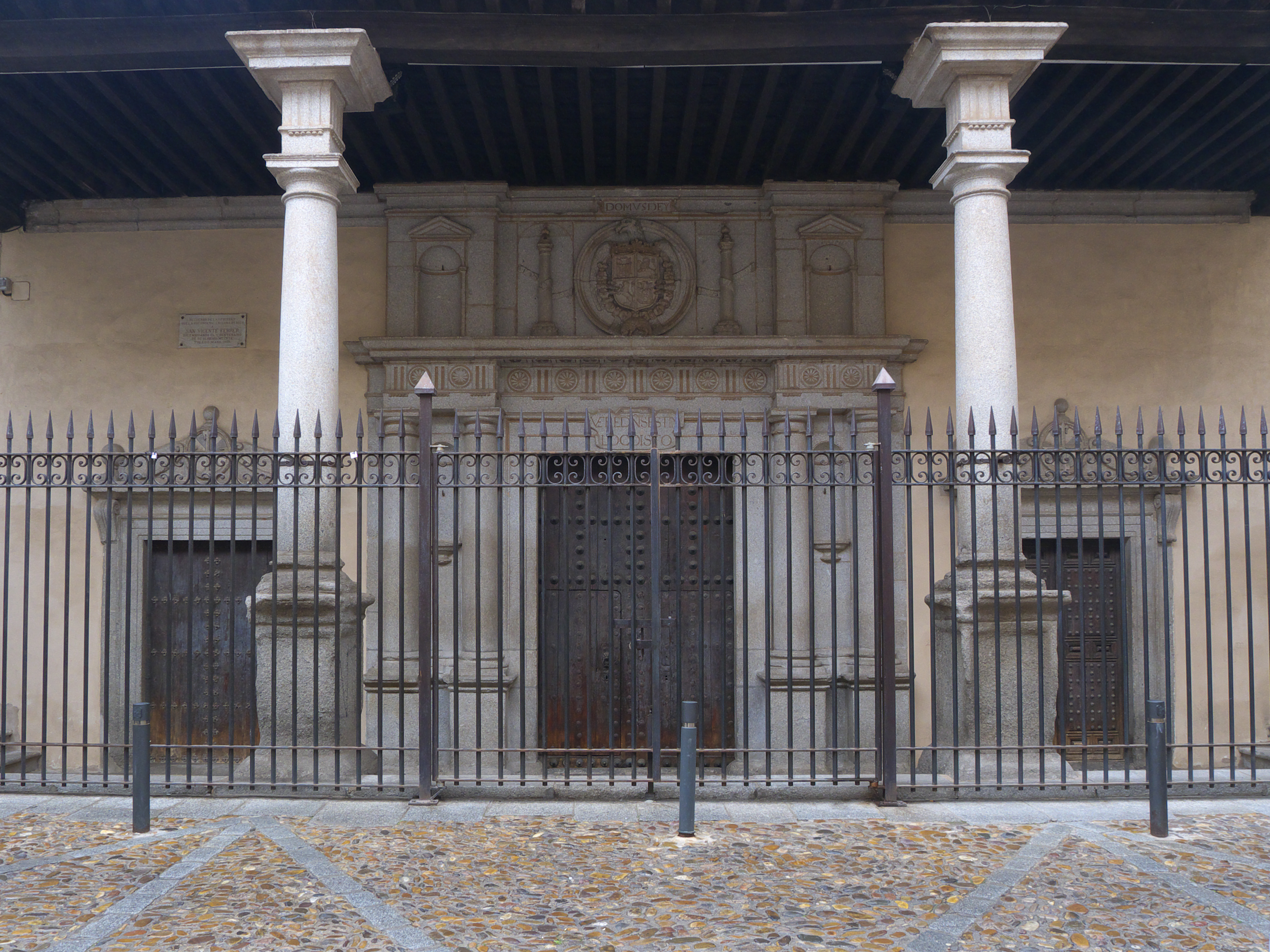 Portada de la iglesia, de Juan Bautista Monegro (1612)